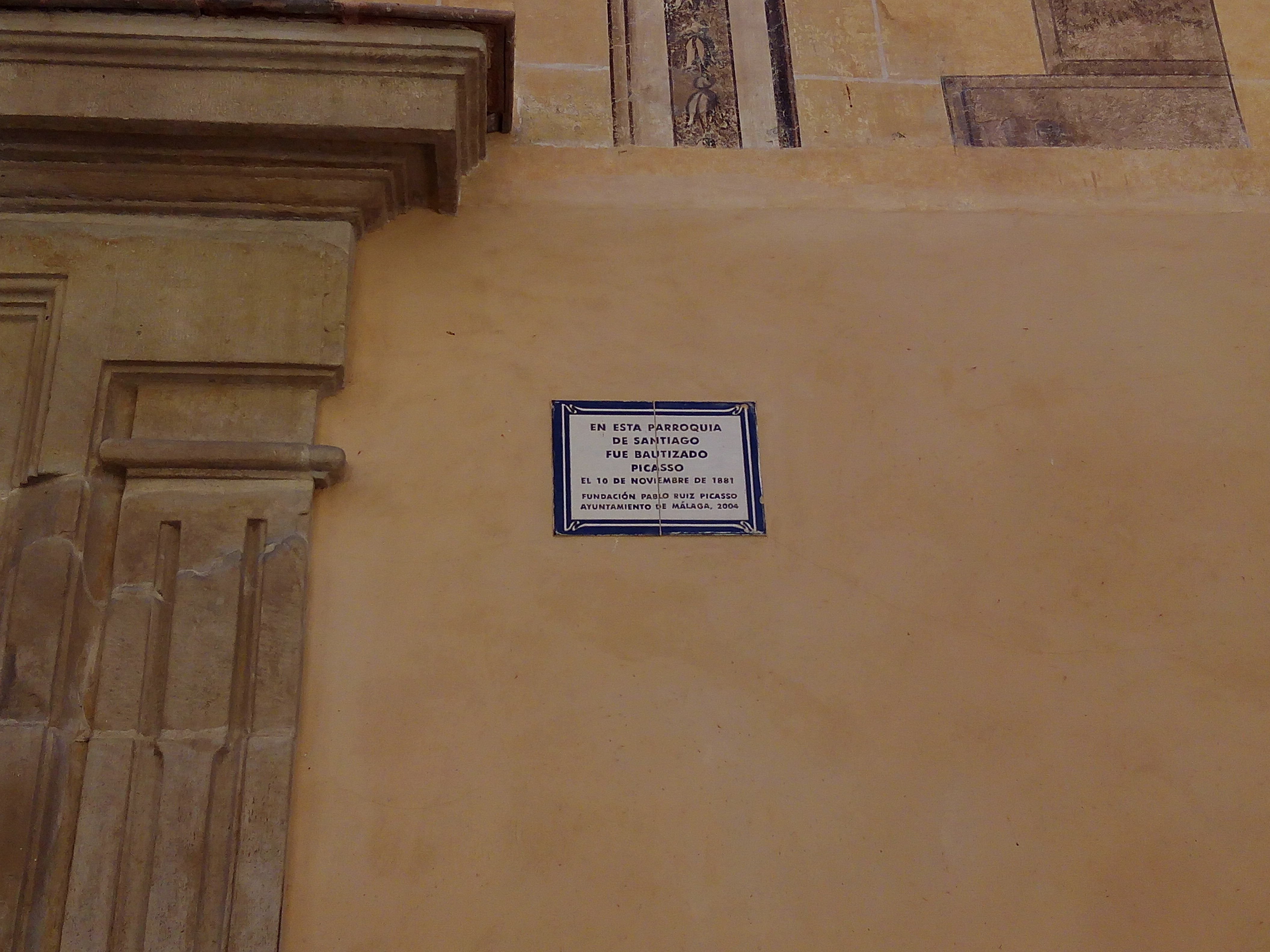 Placa conmemorativa del bautizo de Pablo Picasso en la iglesia de Santiago Apóstol, en Málaga (España).